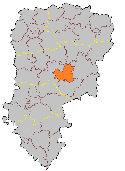 Кантон Лан-Юг на карте департамента Эна